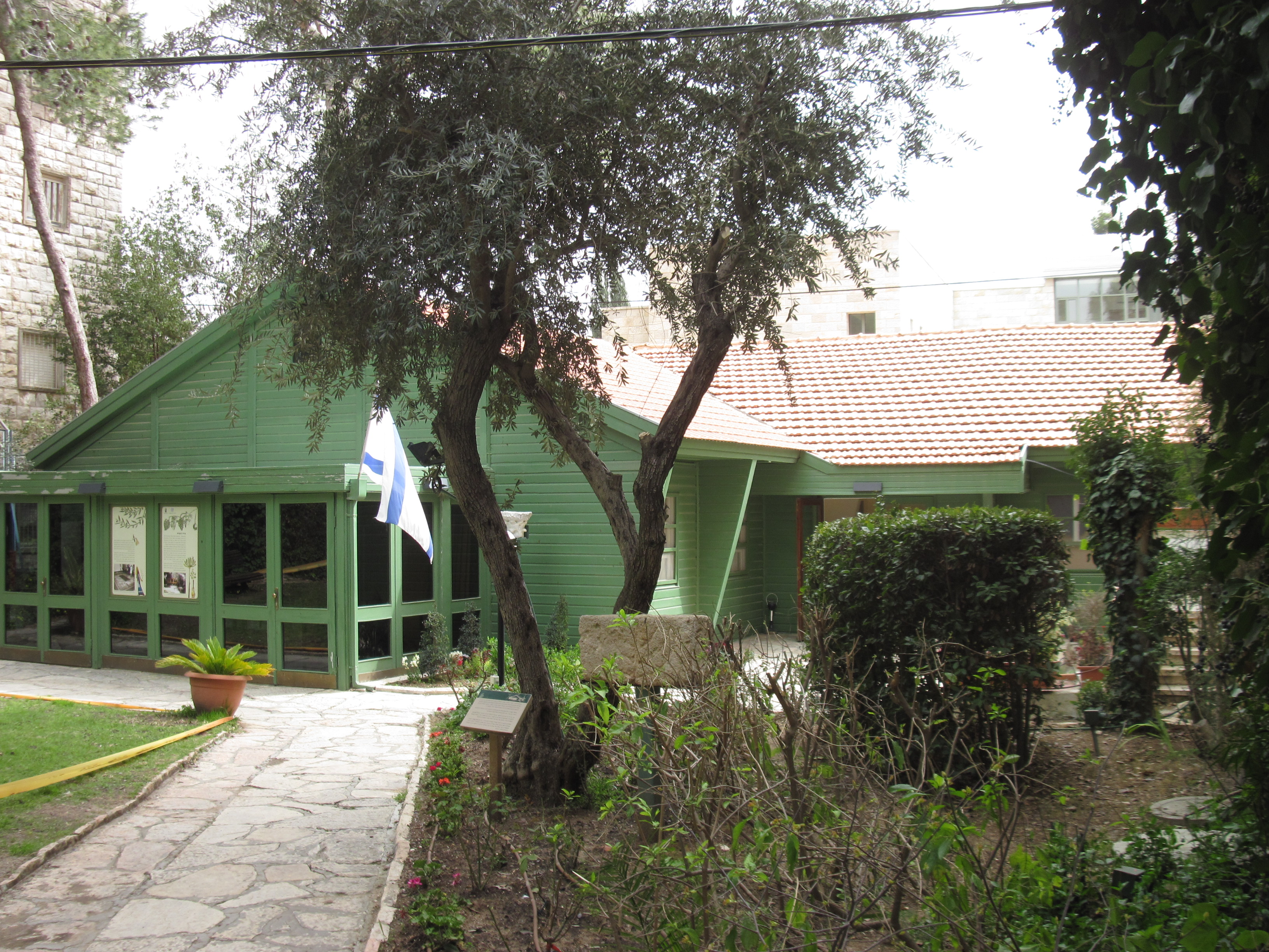 בית הנשיא בתקופת כהונתו של נשיא מדינת ישראל יצחק בן צבי הוא מתחם של מבנים בשכונת רחביה בירושלים, המשמשים כיום את יד יצחק בן צבי. המתחם נמצא ברחוב אלחריזי 17, וכולל את בית ולירו וכן שני צריפים שבדיים שהקימה הממשלה כשבן צבי החל לעבוד במתחם ב-1952.